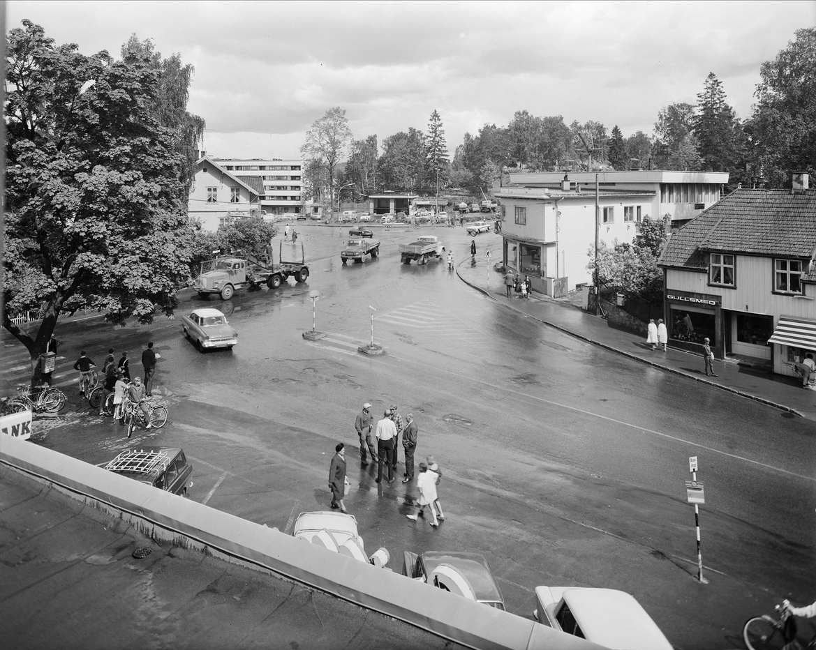 Bekkestuakrysset 1967, i dag Ole Tokeruds plass, sett fra Gamle Ringeriksvei 36